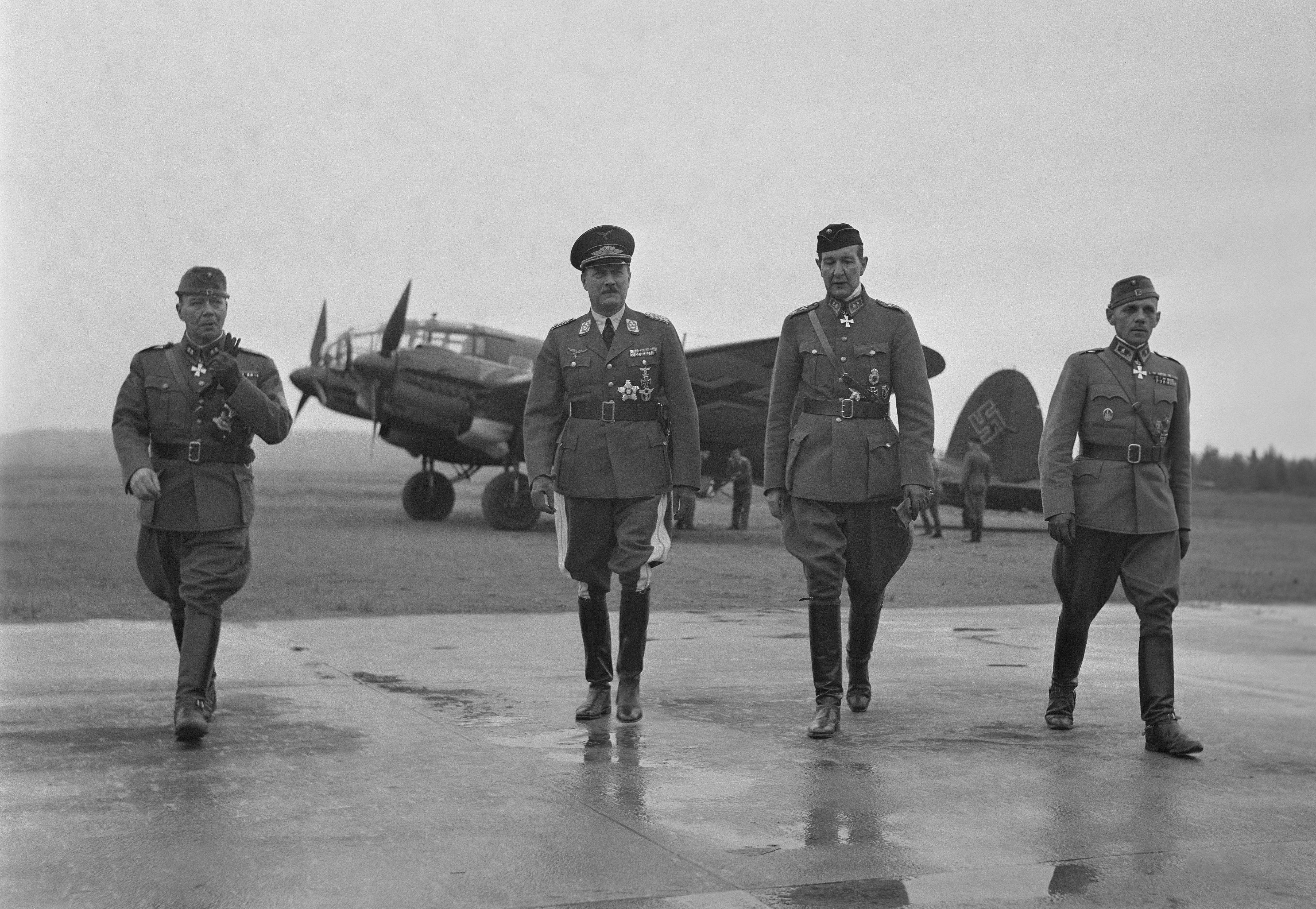 Hitlerin vierailu Suomessa. (Taustalla on Heinkel He 111 H-6. Henkilöt vasemmalta: kenraali Lauri Malmberg, Saksan ilmavoimien päämajoitusmestari Hans-Georg von Seidel, ilmavoimien komentaja kenraaliluutnantti Jarl Frithiof Lundqvist ja kenraalimajuri Ruben Lagus). Kuvauspaikka: Immolan lentokenttä